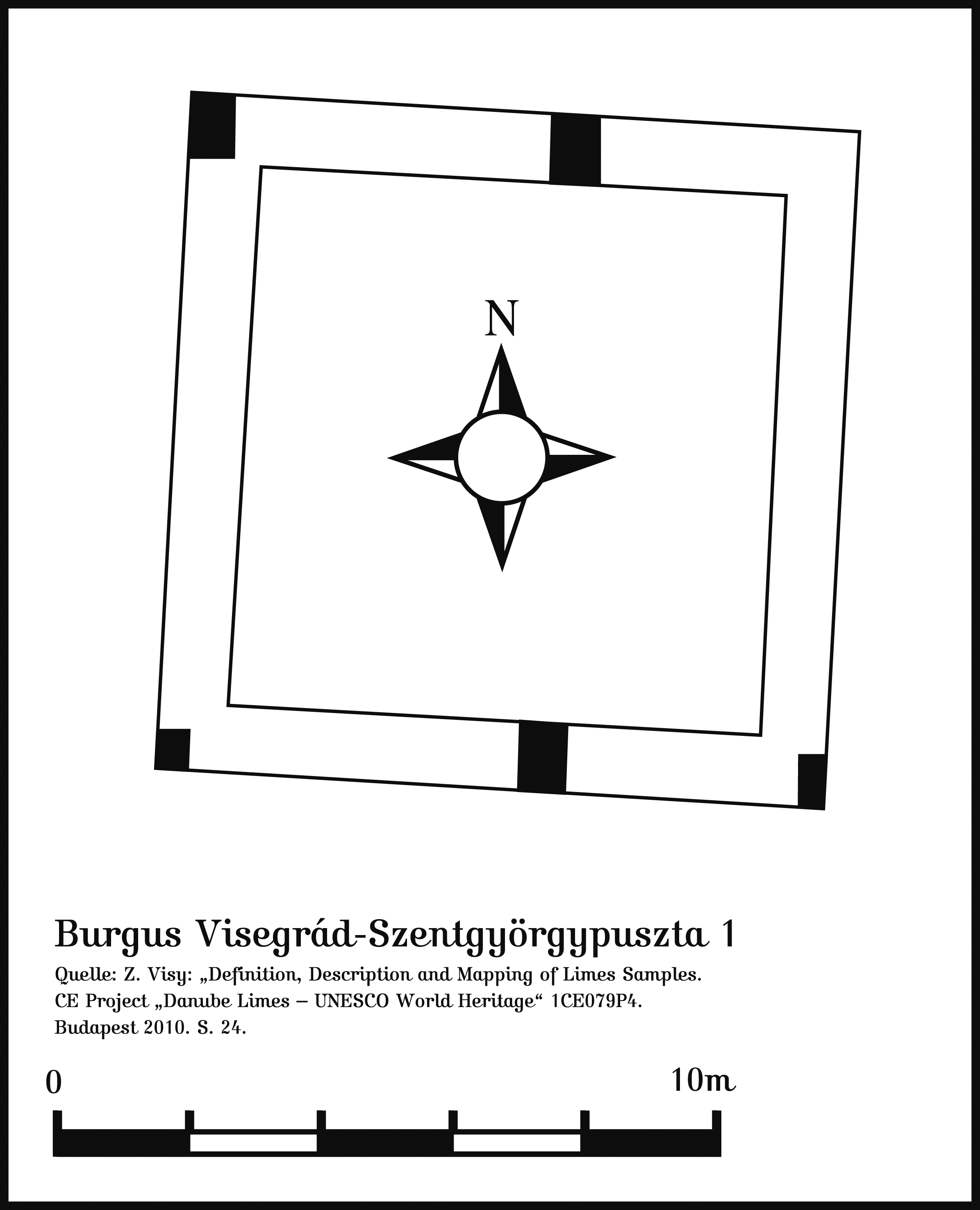 Der 1955 durch Sándor Soproni ergrabene 10,4×10,2 m große valentinianische Burgus Visegrád-Szentgyörgypuszta 1 am nordpannonischen Donauknie in Ungarn.